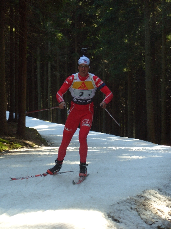 Lars Berger in Nove Mesto na Morave